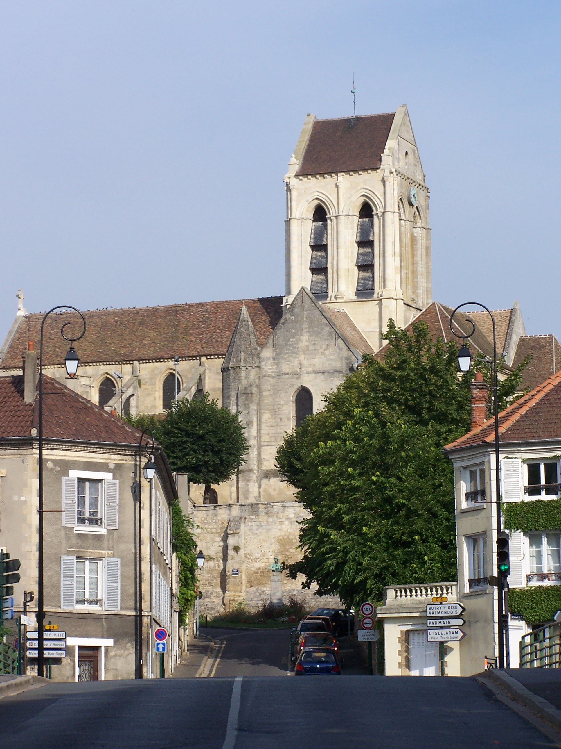 Église Notre-Dame-de-l'Assomption à Auvers-sur-Oise (Val-d'Oise, France)